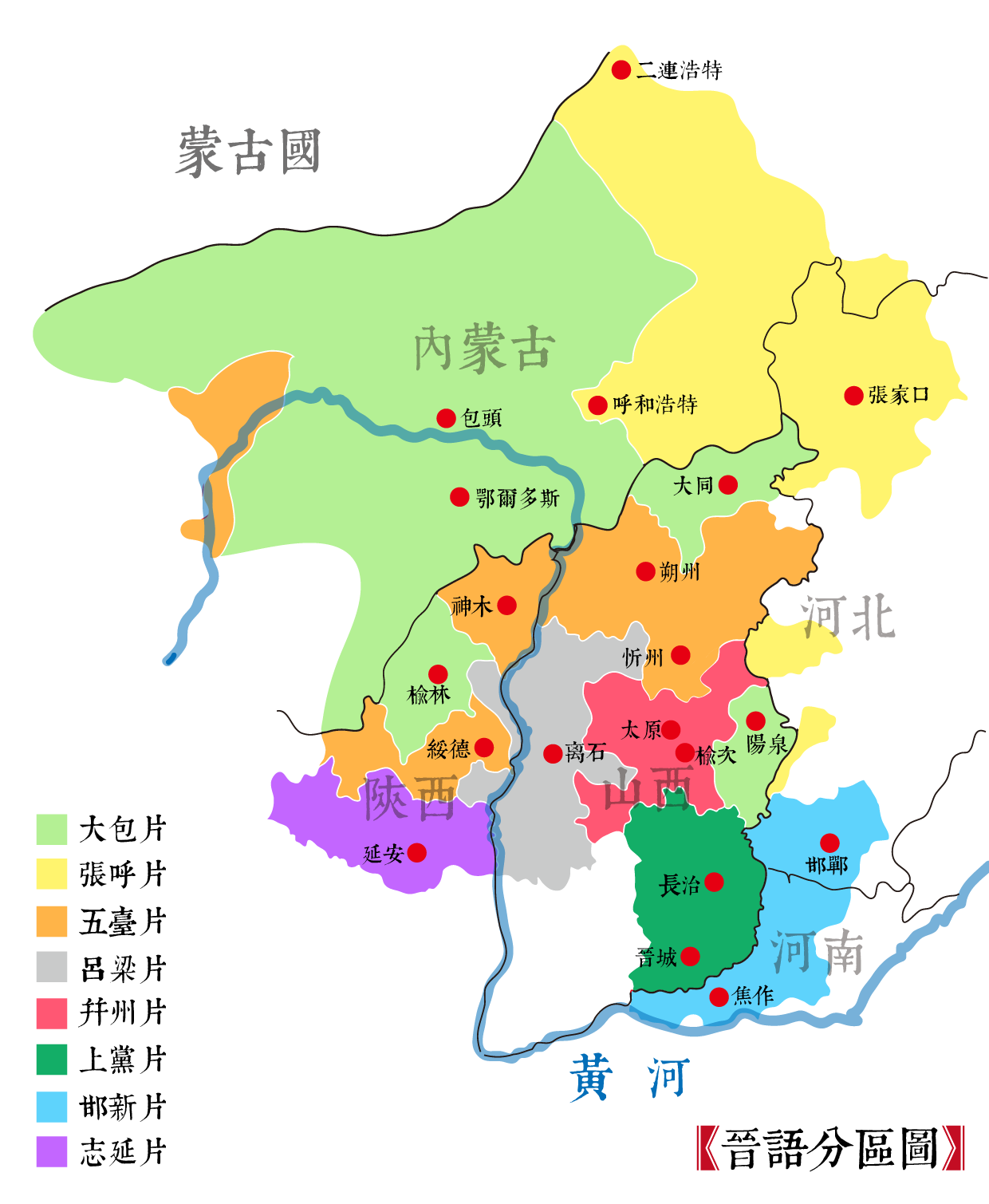 晉語分區圖 2006版，根據【沈明-晋语的分区（稿），《方言》2006年第4期343~356页】繪製